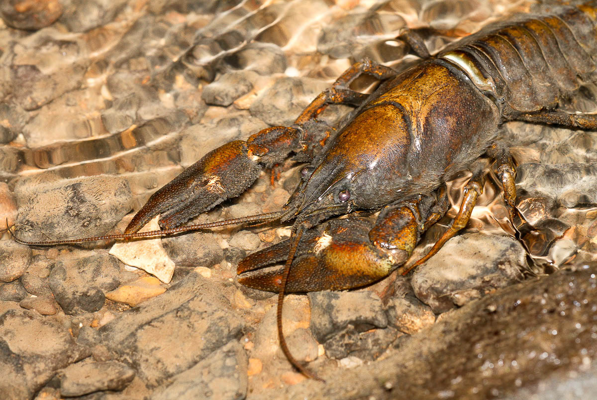 Astacus astacus